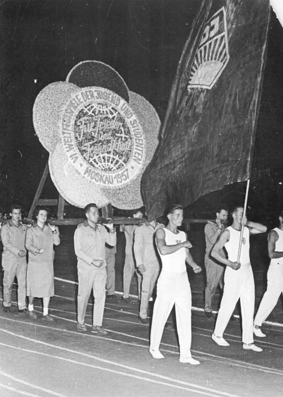 Zentralbild Wlocka, Dittrich 18.7.1957 Schlegel Turn- und Sporttreffen der Jugend in Leipzig vom 18. bis 21. Juli 1957. Ein grosses Turn- und Sporttreffen findet vom 18. bis 21. Juli 1957 in Leipzig statt. Zehntausende von Jugendlichen werden in friedlichem Wettstreit ihr Können unter Beweis stellen und bei Sport und Kulturveranstaltungen in der alten Messemetropole glückliche Tage verleben. UBz: FDJ-ler mit dem Emblem der VI. Weltfestspiele.